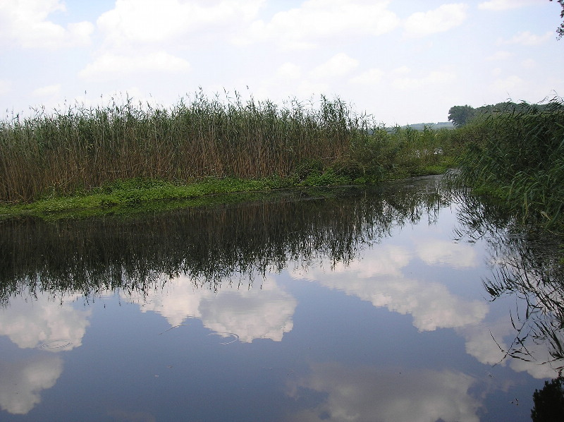 Village Prelesne. Ukraine. Donetsk region.